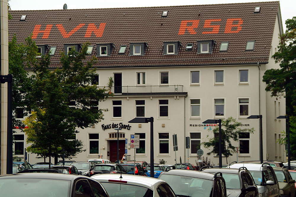 Auf dem Haus des Sports wird - gesehen von der Hildesheimer Straße aus - die durch Dachziegel gelegten Kürzel HVN für den Handballverband Niedersachsen und RSB für den Regionssportbund Hannover sichtbar ...